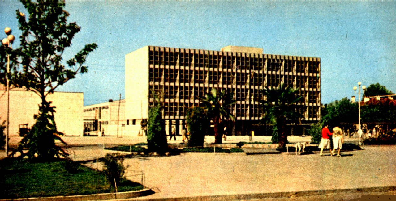 Eski Sakarya Valilik Binası